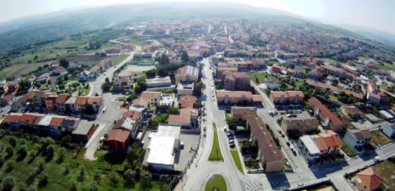 Usini, vista dall'alto